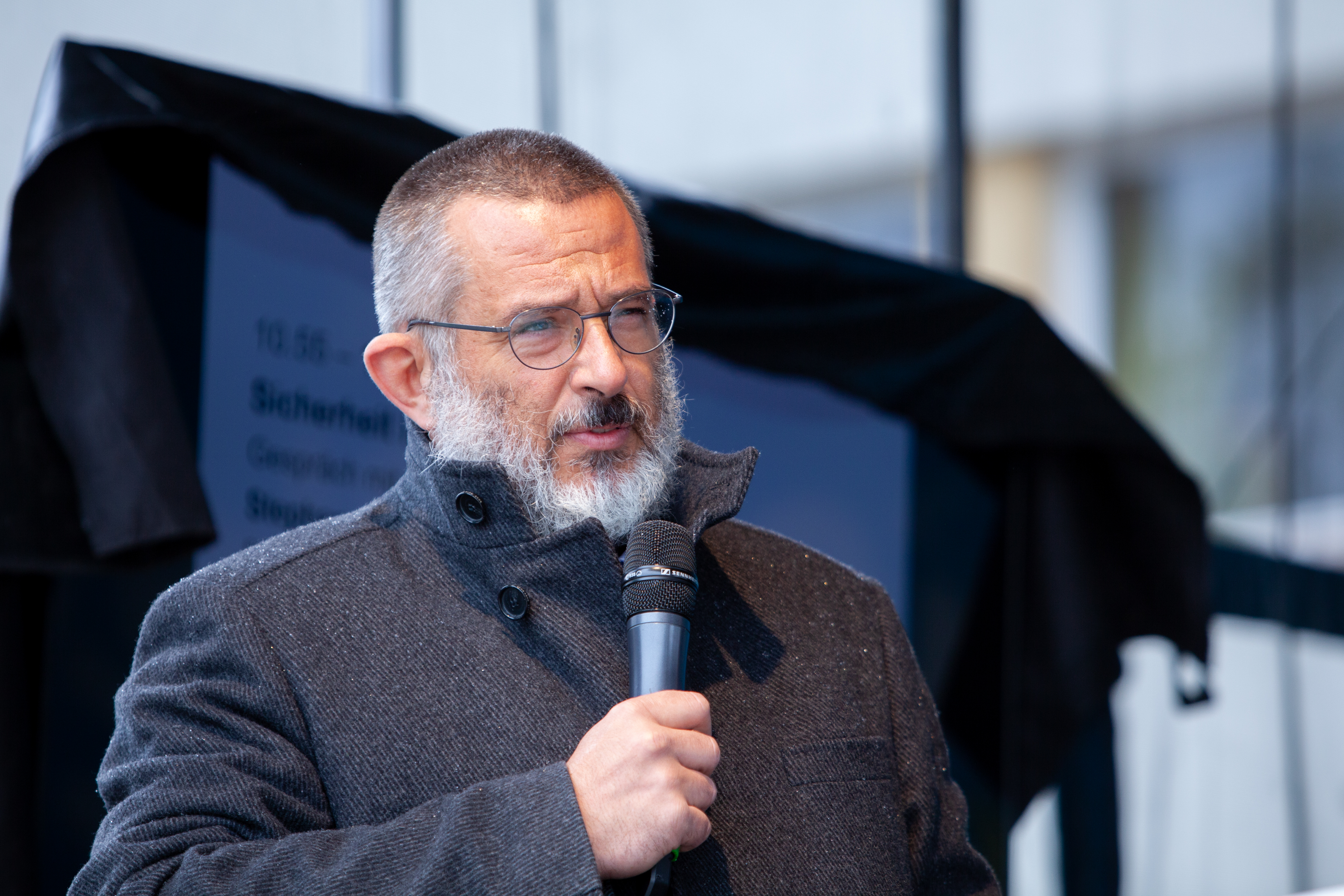 Stephan J. Kramer bei einem Podiumsgespräch in Suhl, 4.5.2019